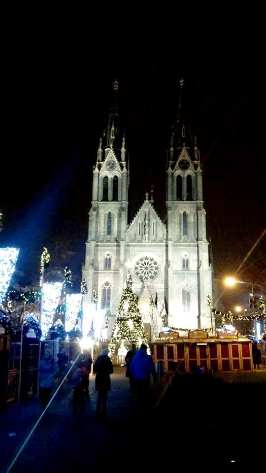 La iglesia en la plaza principal de Vinohrady.